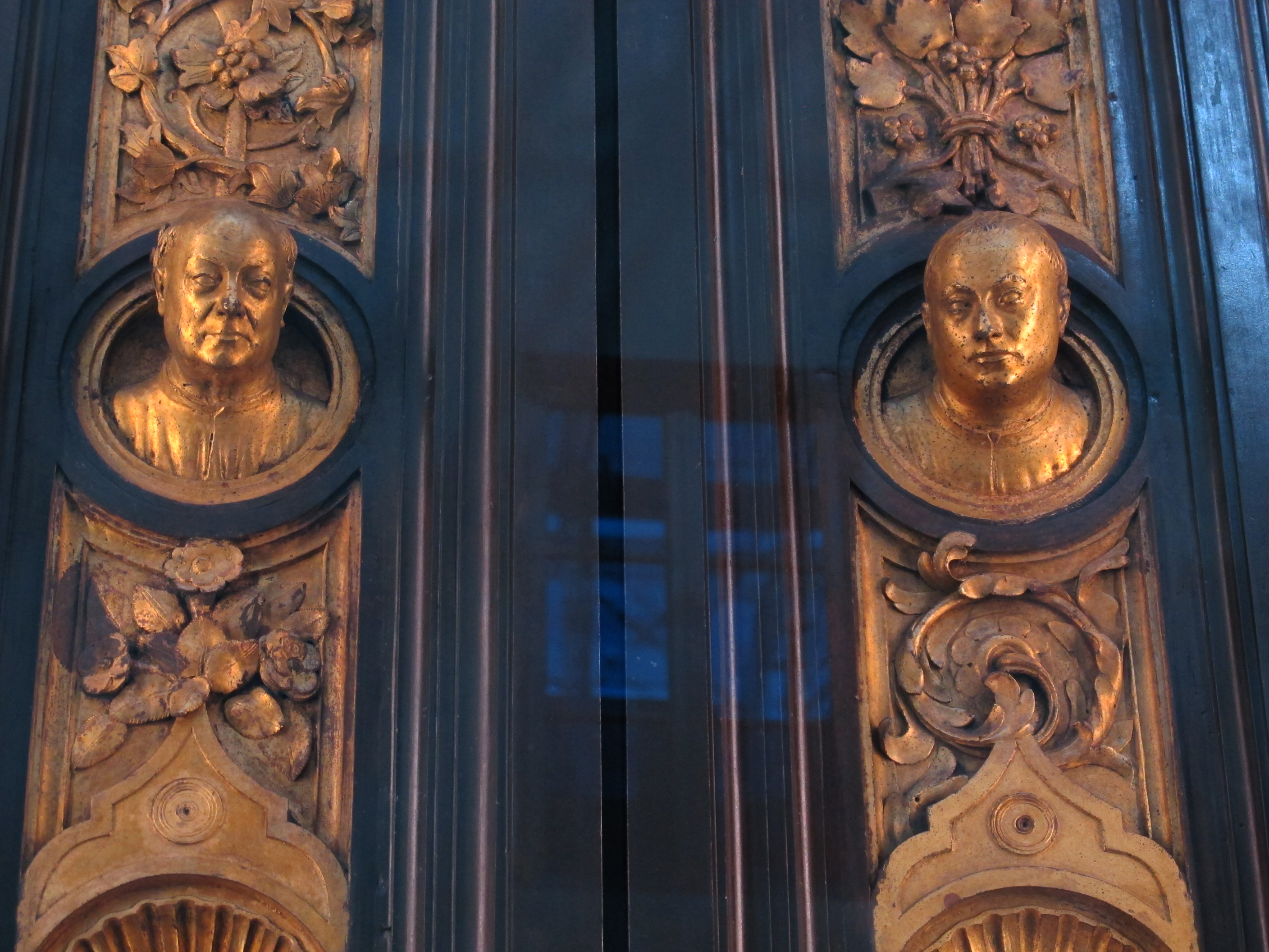 Porta del paradiso dopo il restauro, testine 05 autoritratto ghiberti